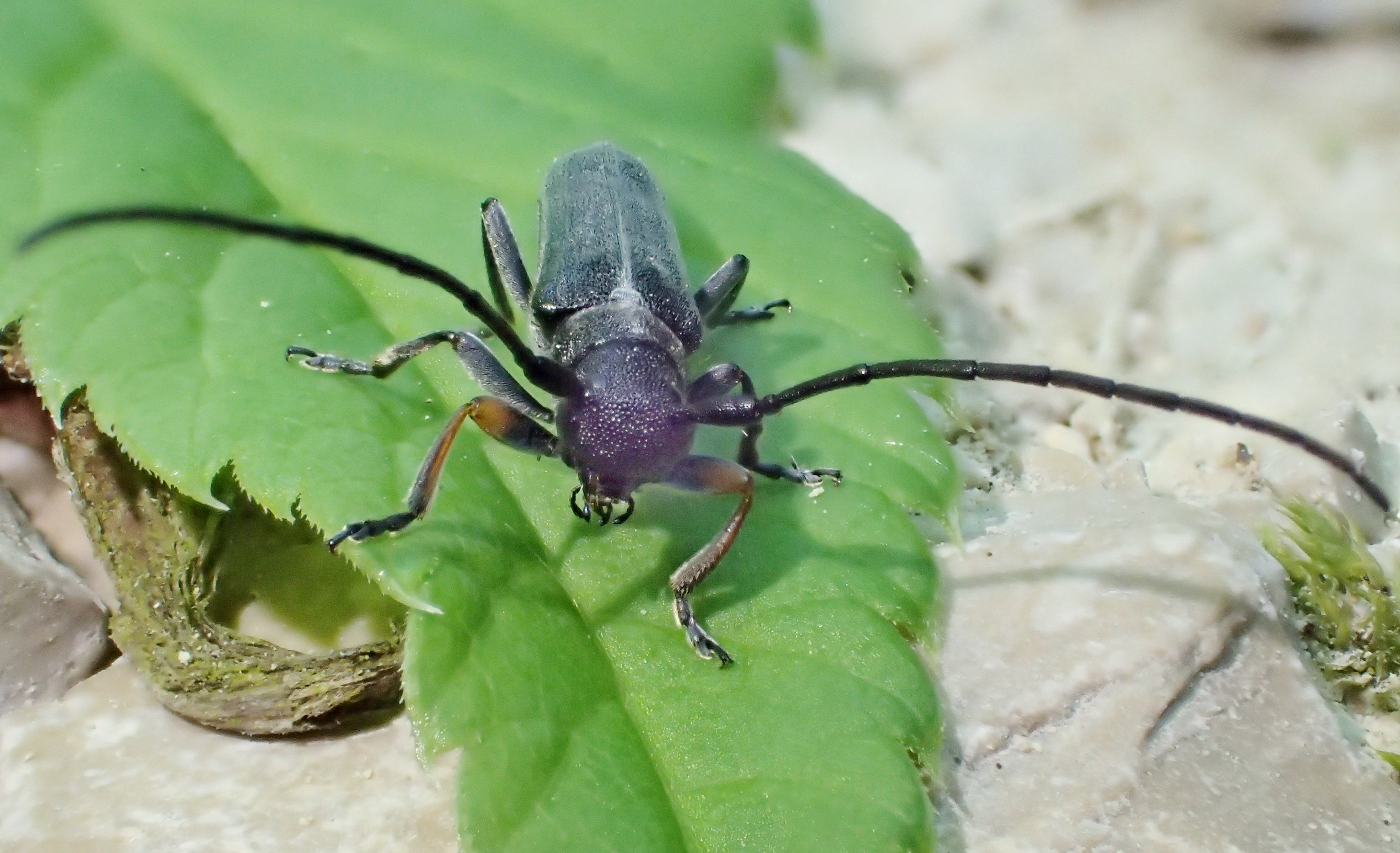 Phytoecia cylindrica aus Süddeutschland, bei Mühlheim/Donau